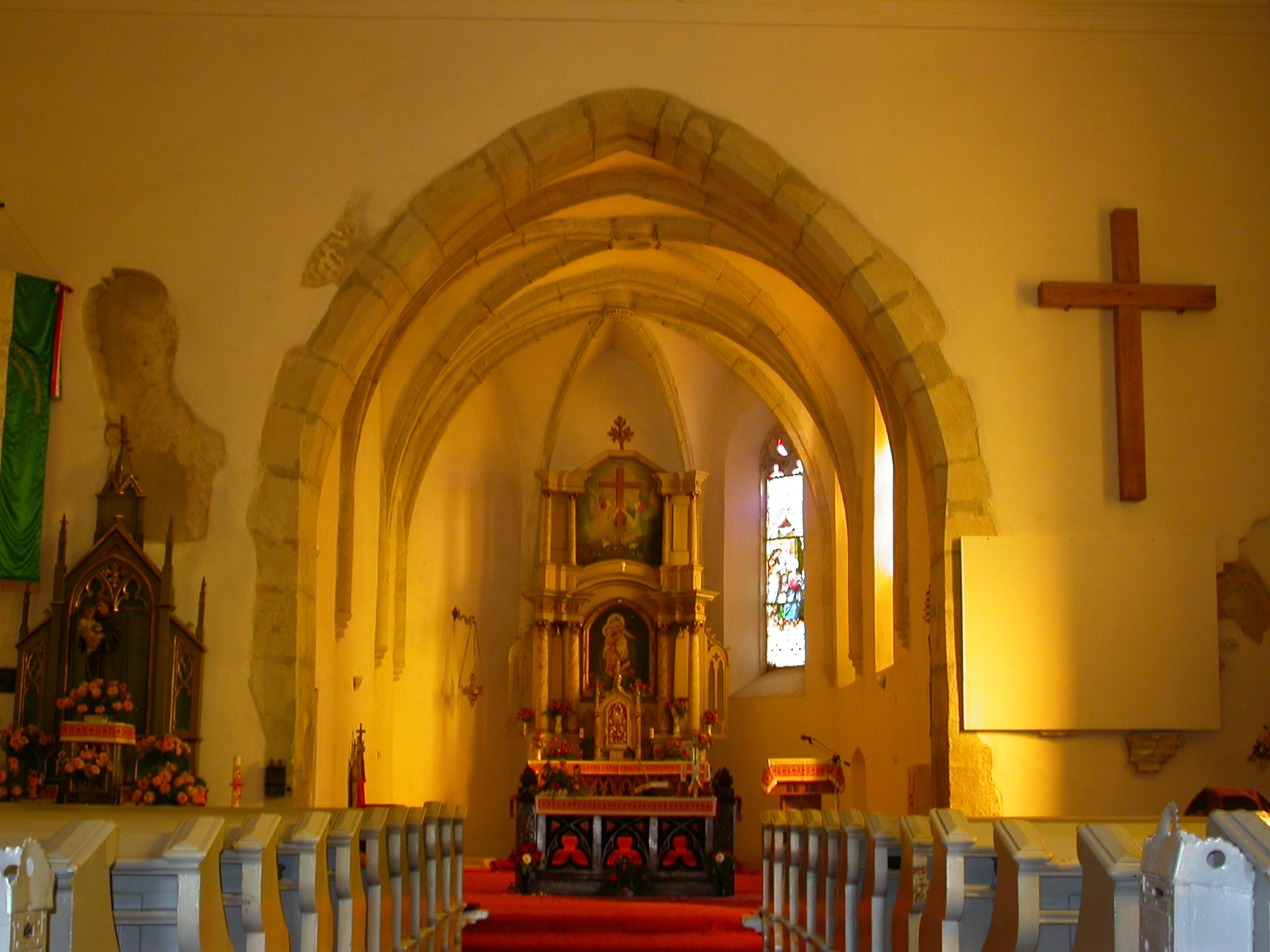 Biserica romano-catolică, sec. XV - XVIII